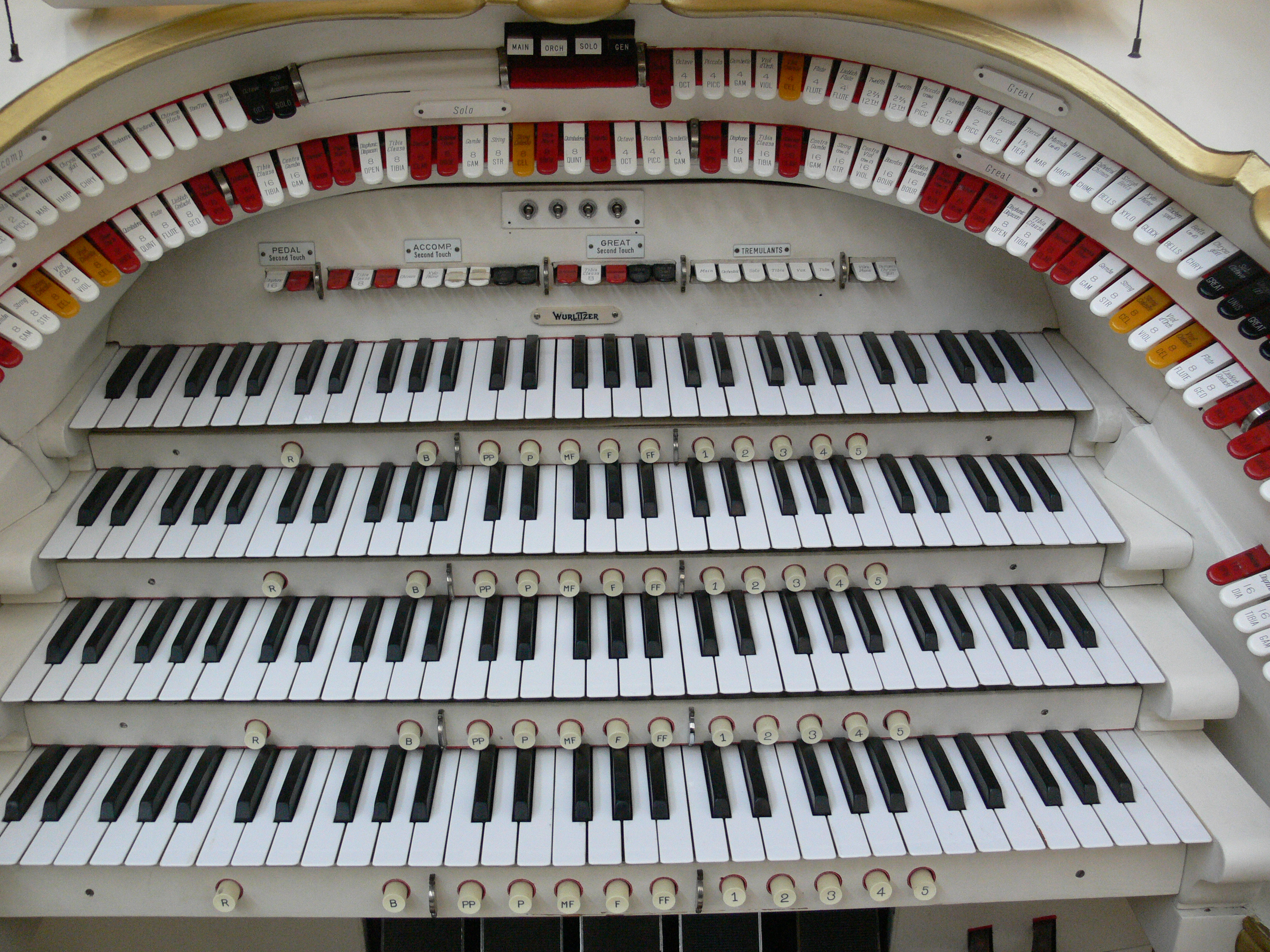 Mighty Wurlitzer, Musikinstrumenten-Museum Berlin Console